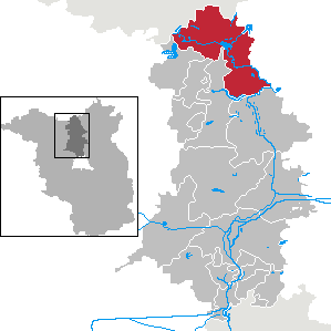 Fürstenberg/Havel in Brandenburg (Country) - District Oberhavel